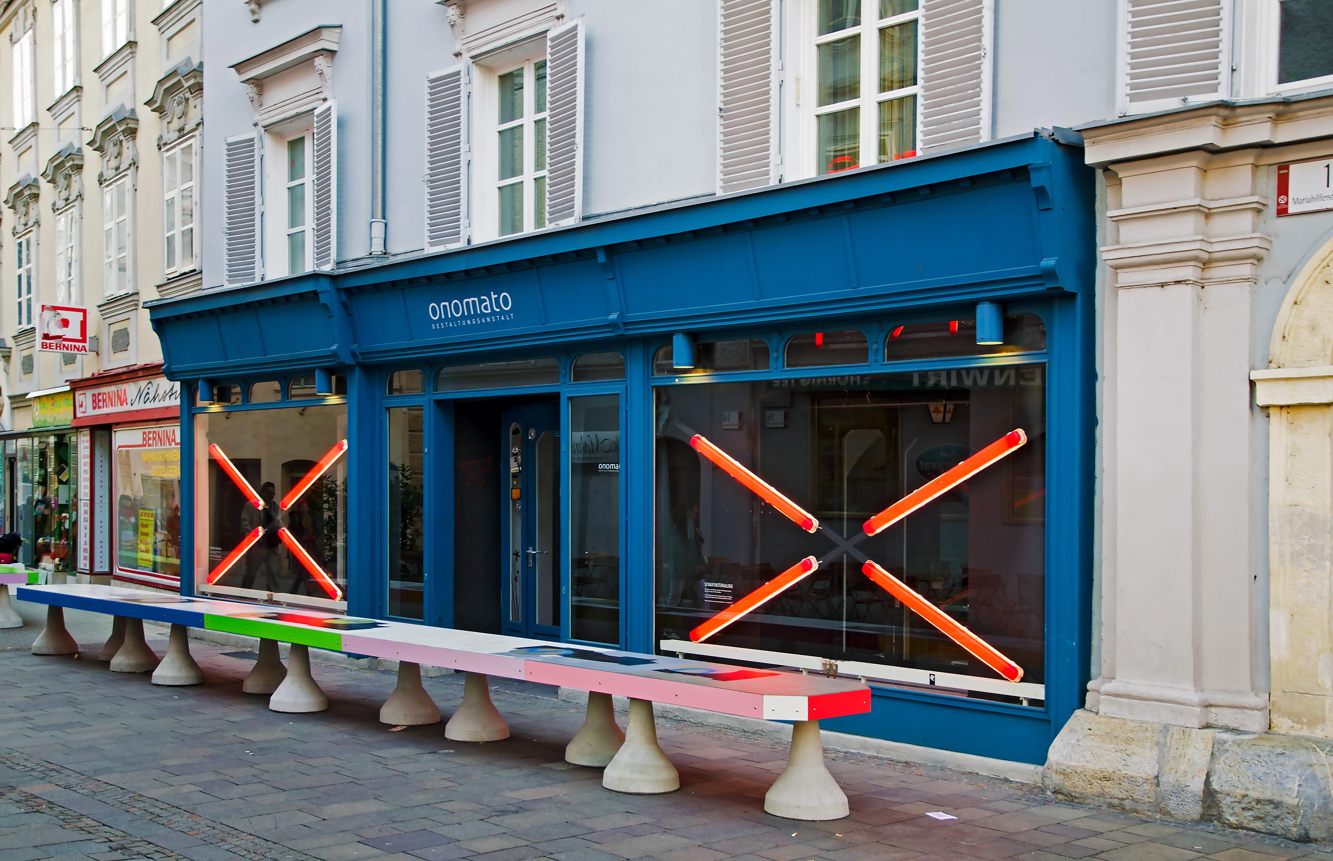 Graz, Mariahilferstraße 13, Steirischer Herbst 2011, Projekt Festivaldistrikt Laden (Maruša Sagadin)